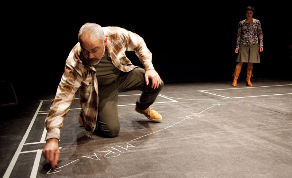 Unha imaxe de Citizen, obra estreada por Chévere.